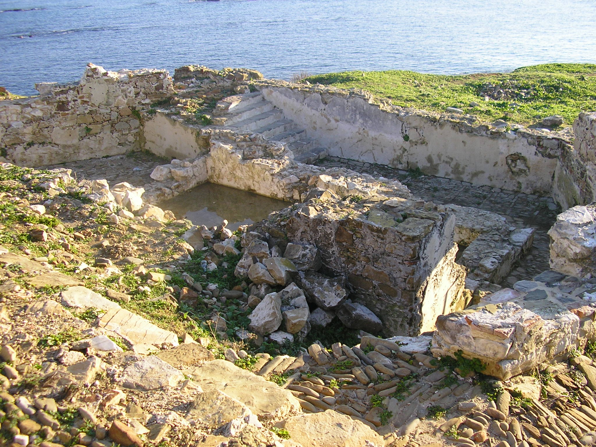 Fuerte de San García de Algeciras, Andalucía, España.